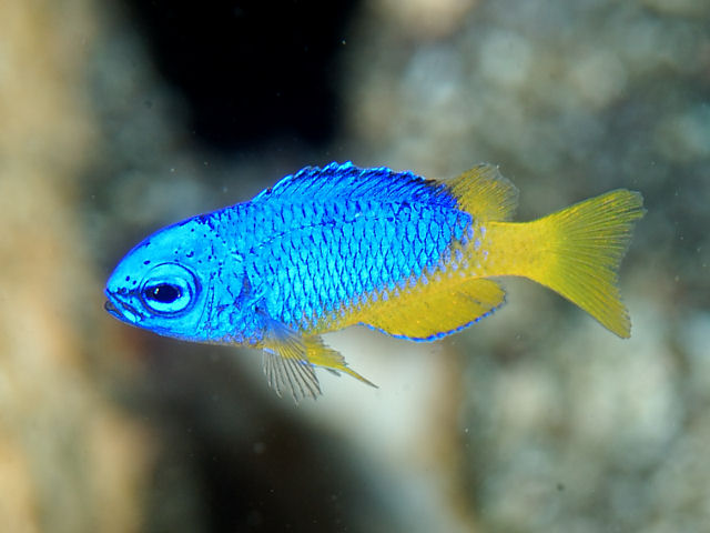 ソラスズメダイ Pomacentrus coelestis